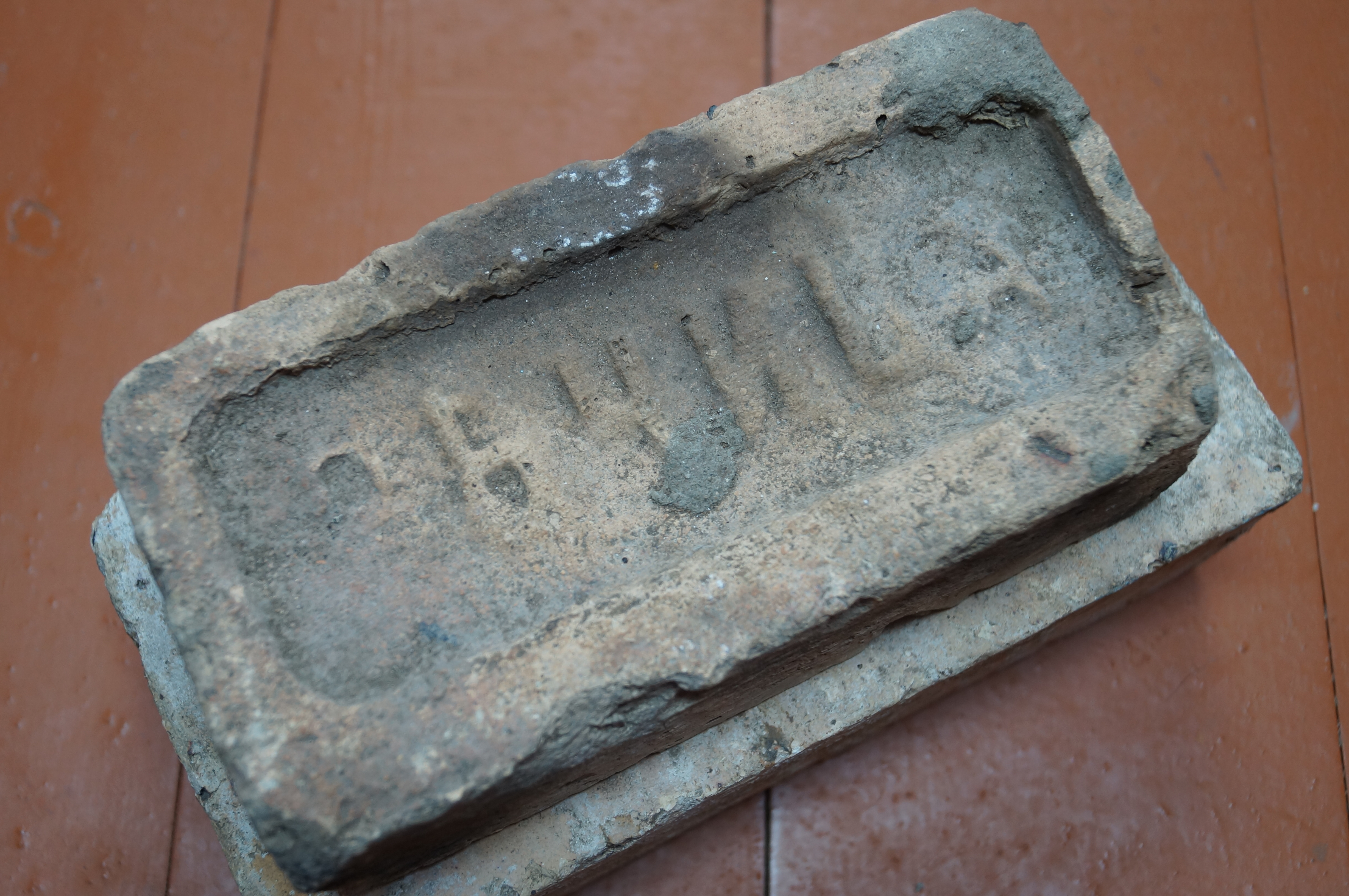 Кирпич Речицкого завода